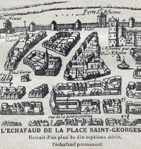 L'échafaud permanent (haut à droite) de la place Saint-Georges (Toulouse, au XVIIe siècle, extrait d'un plan de l'époque).